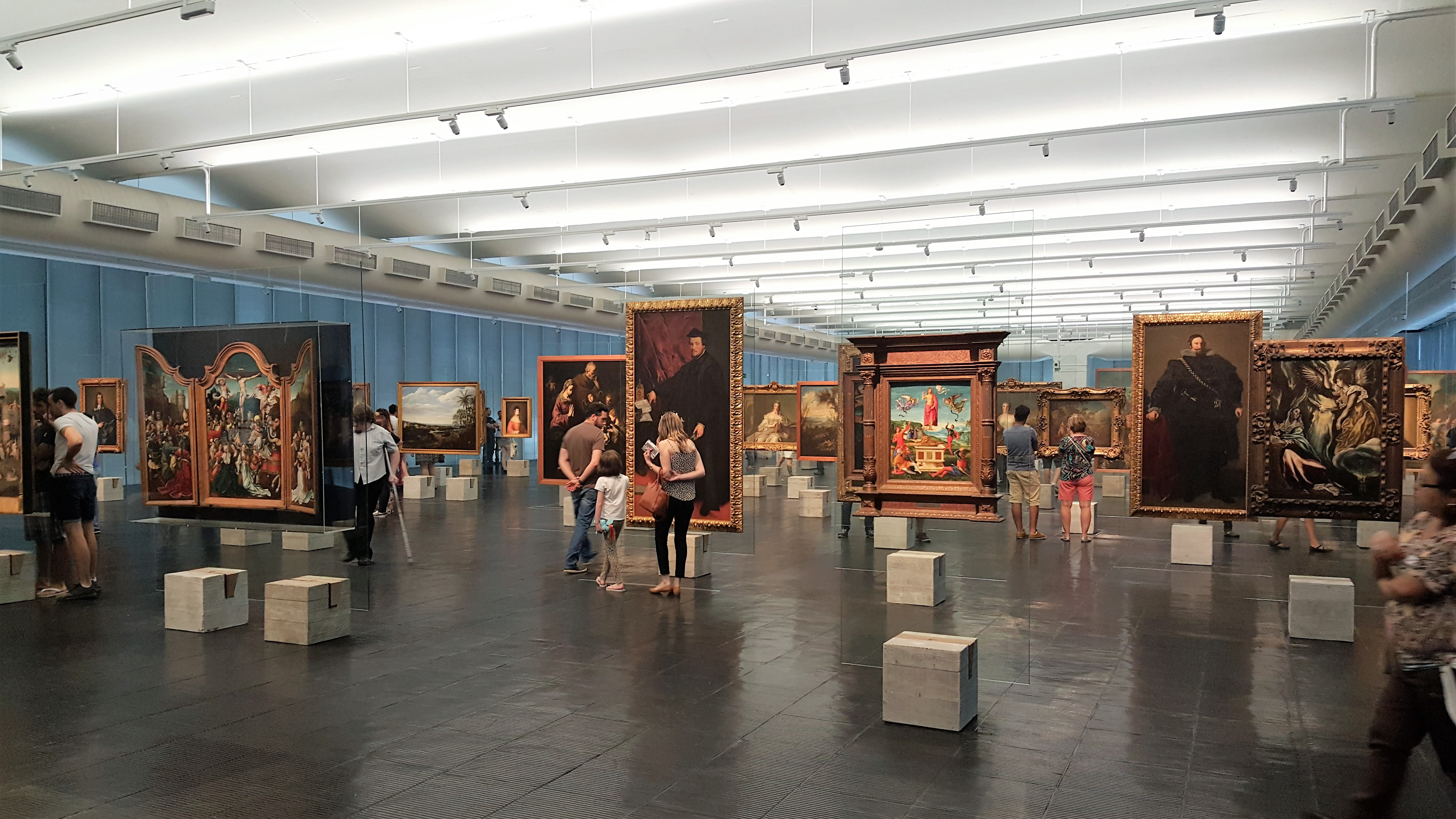 Museu de Arte de São Paulo Assis Chateaubriand - MASP: edifício e acervo móvel constituído pelos cavaletes de concreto e cristal